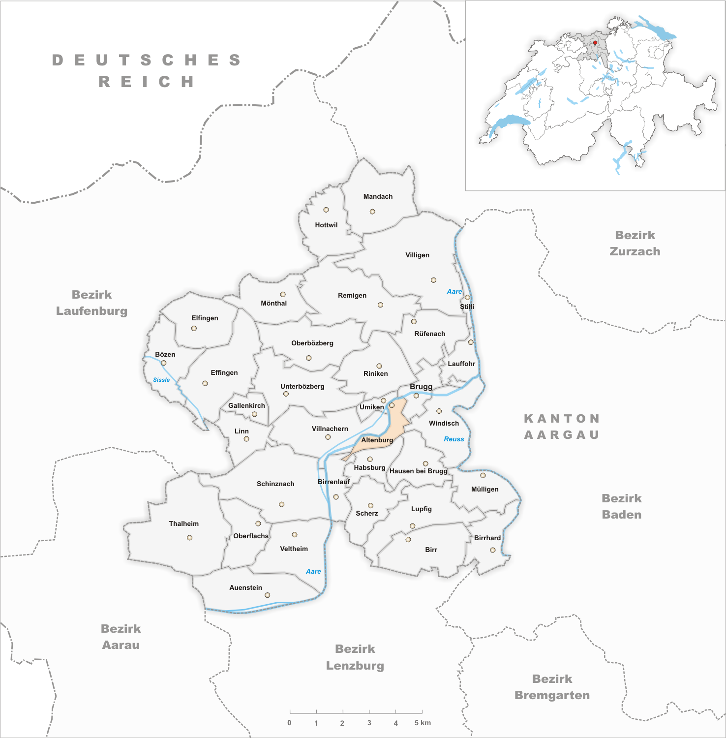 Municipality Altenburg